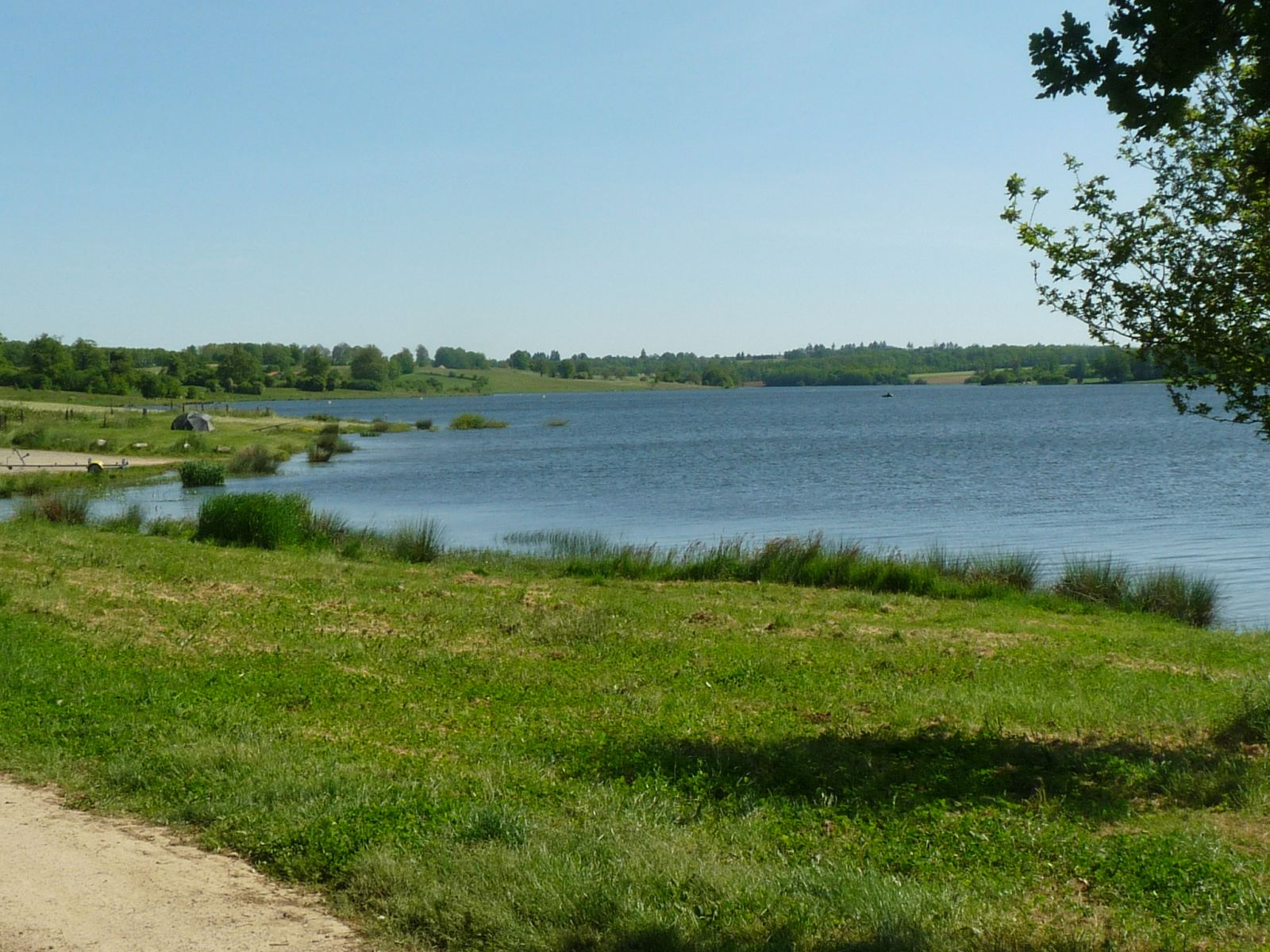 lac du Mas Chaban à Lésignac-Durand, Charente, France